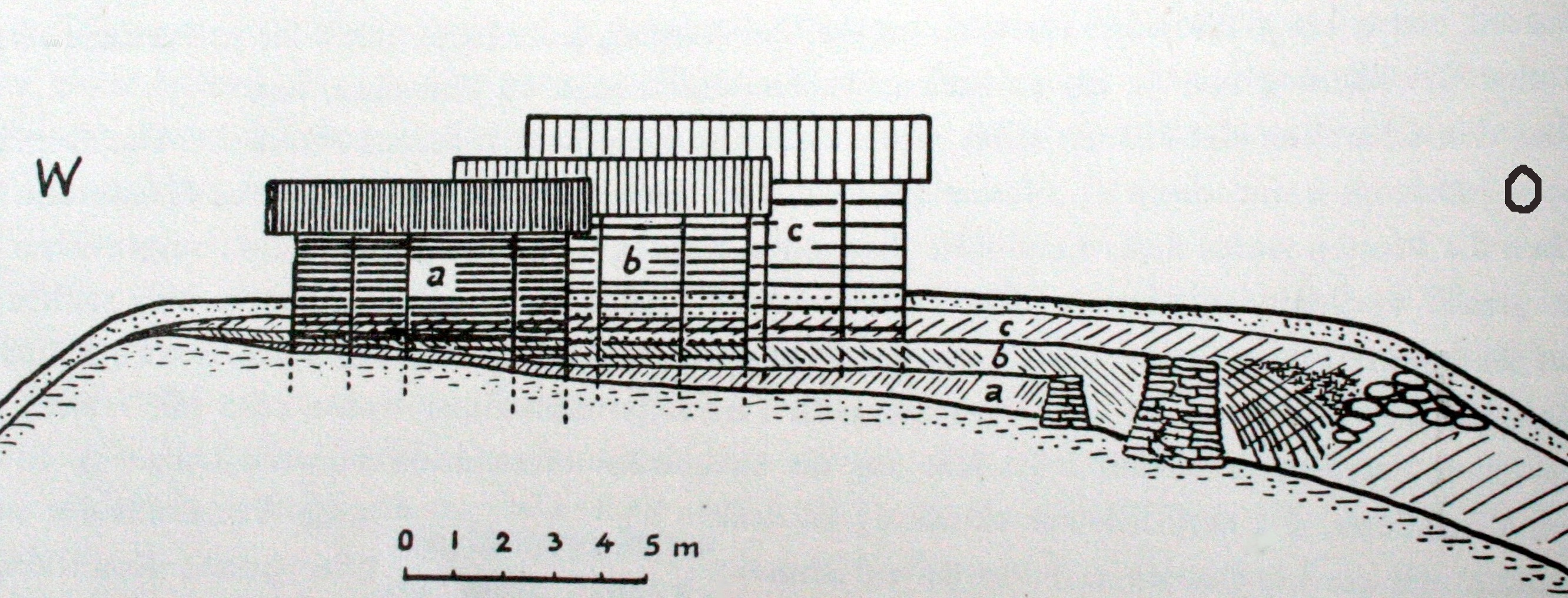 Anlage der Hütten auf Crestaulta